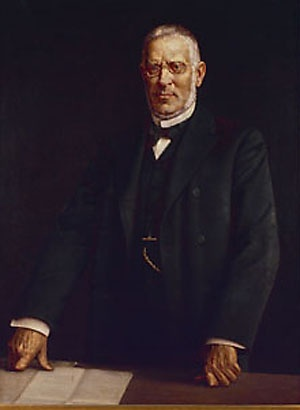 Franz Ritter von Hopfen blickt dem Betrachter durch seine Brille entschlossen entgegen. Seine Hände hat er auf den Arbeitstisch vor sich gestützt. Auf diesem liegt ein Schriftstück, welches von dem Präsidenten des Abgeordnetenhauses offenbar gerade bearbeitet wird. Diese Darstellung einer Arbeitssituation vermittelt den Eindruck von großem Verantwortungsbewusstsein und Ernsthaftigkeit.